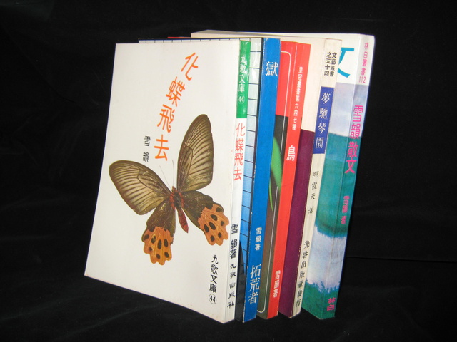 楊召南之已出版文學作品。楊召南，筆名雪韻、照霞天，台灣女性散文家。